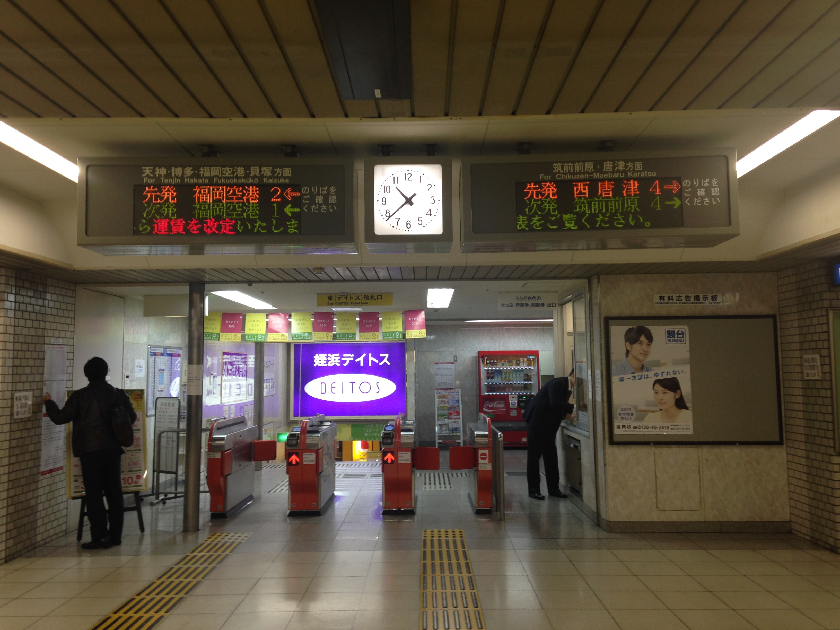 姪浜駅の改札口